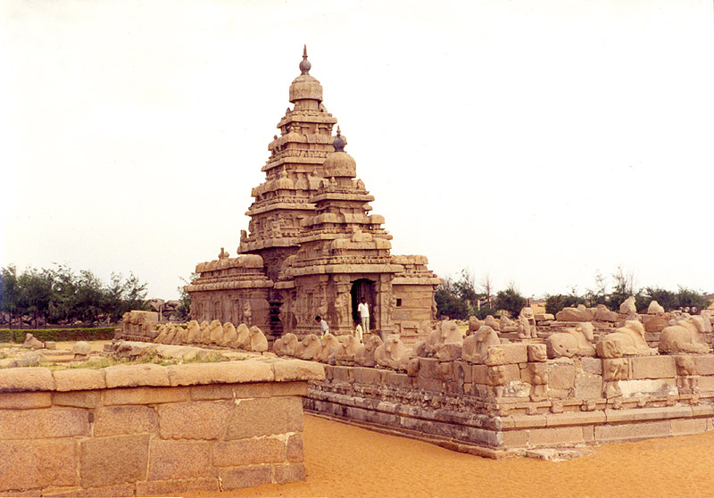 Le temple du Rivage à Mahaballipuram au Tamil Nadu en Inde The Shore Temple at Mahabalipuram, Tamil Nadu, India